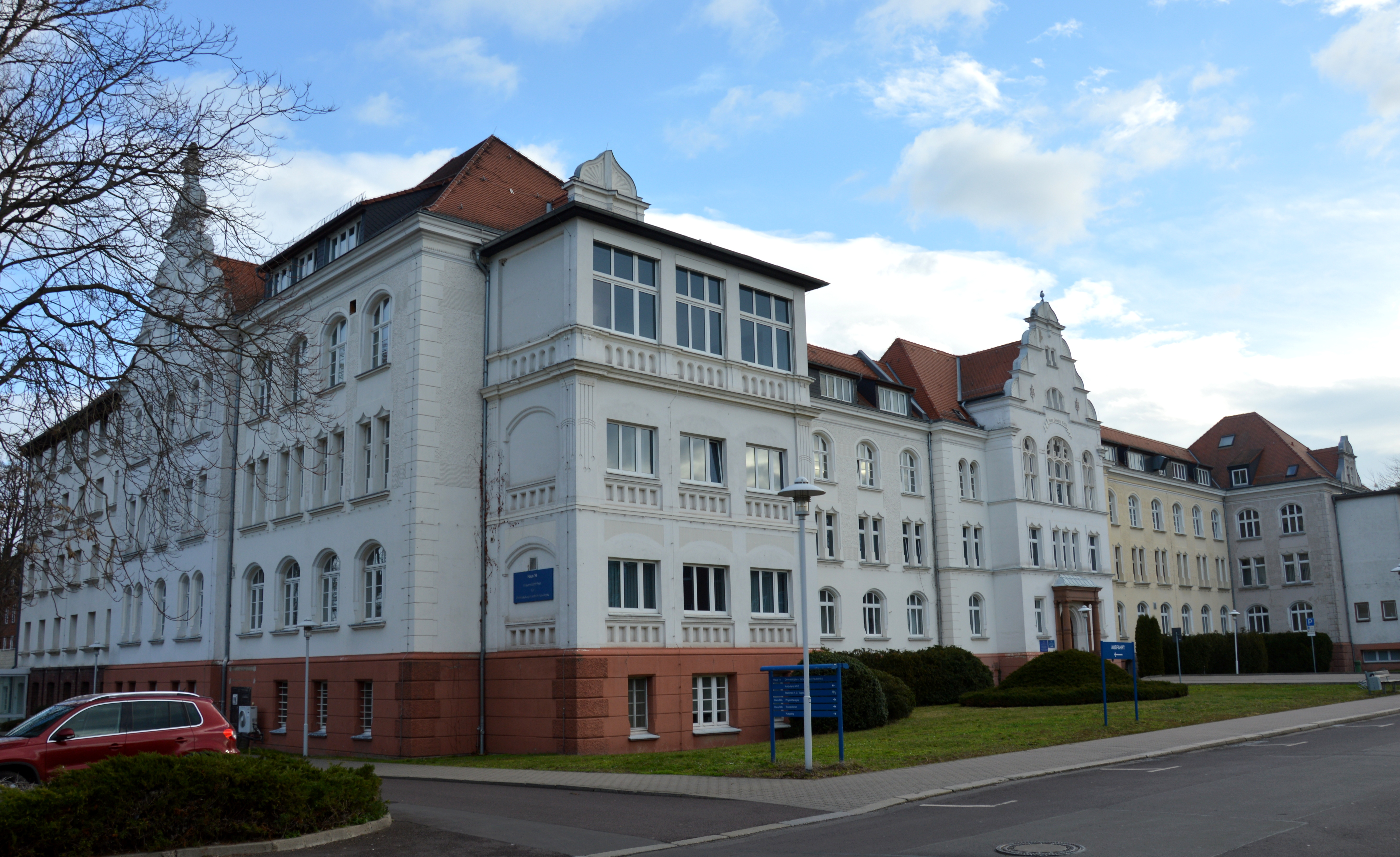 Uniklinikum Magdeburg Gebäude 14